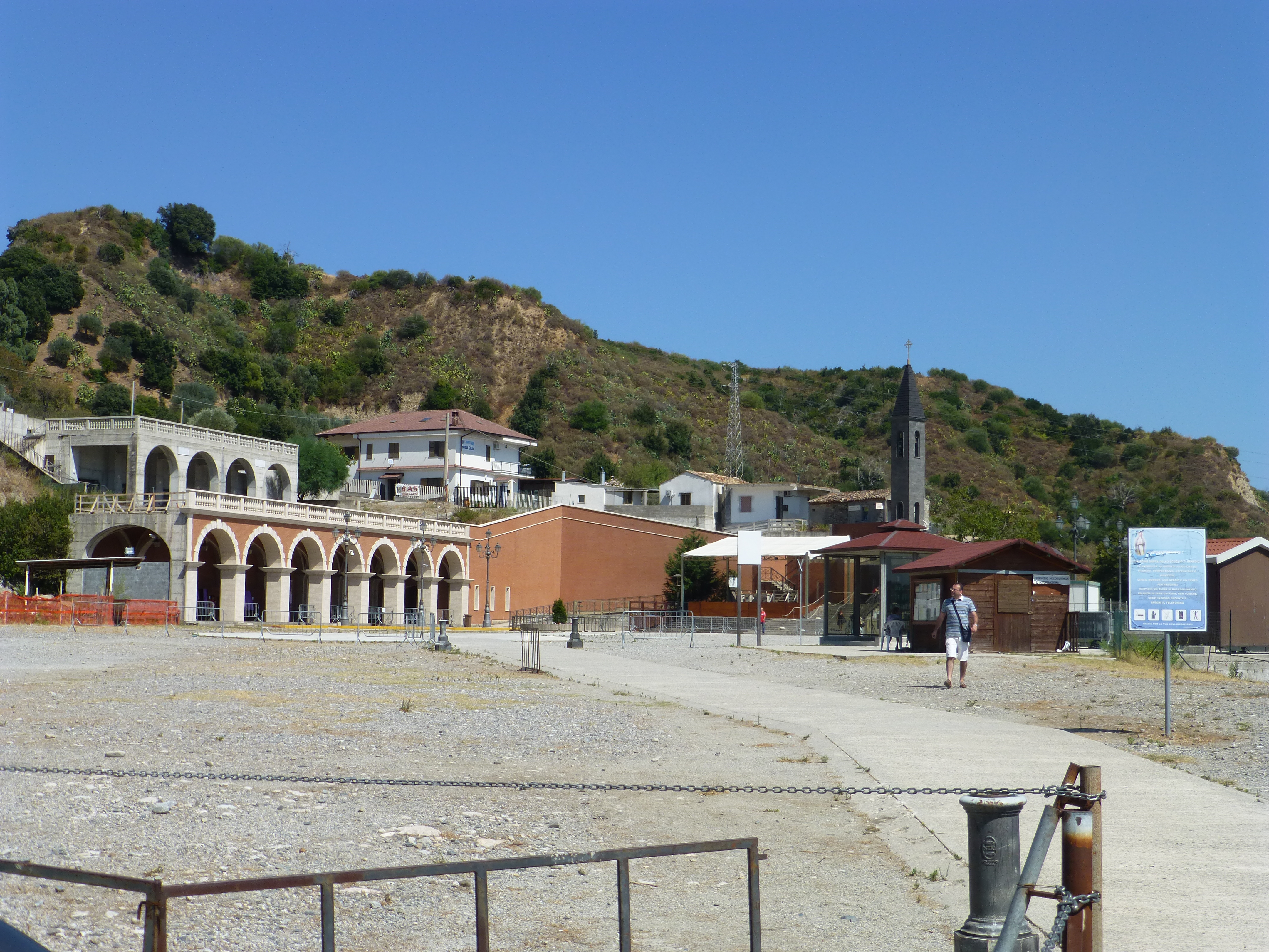 Madonna dello Scoglio edifici